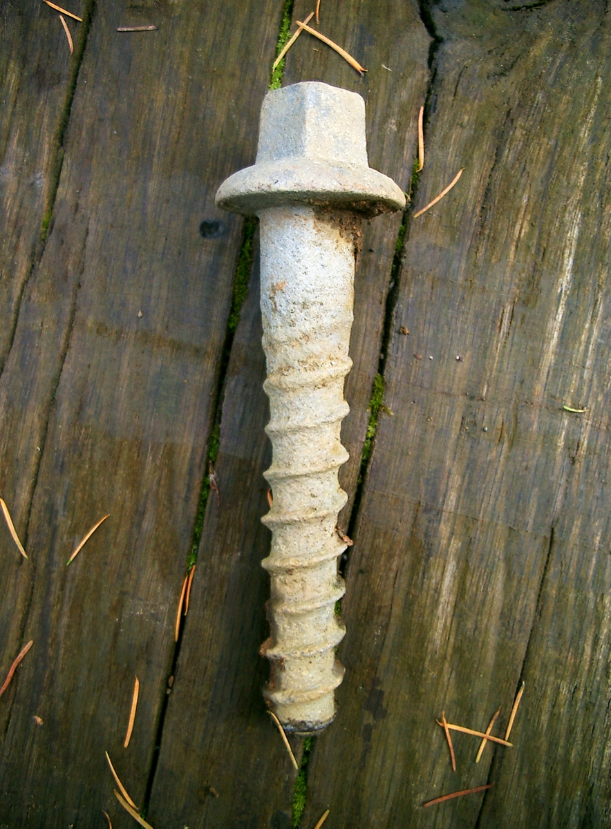 Tirefond; Source: Eege Foto vum User:Pecalux; Datum: 03.11.2006